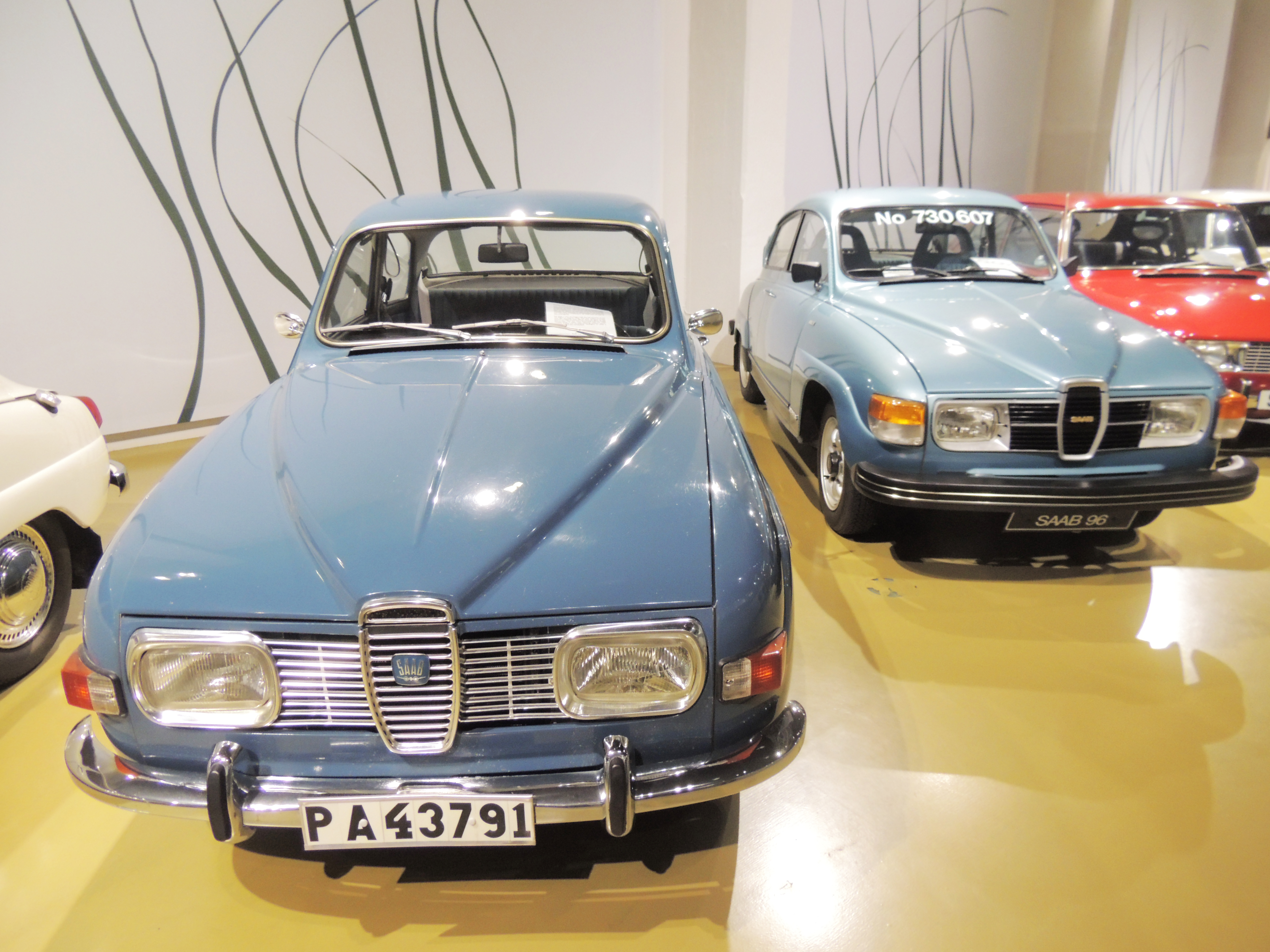 Saab 96